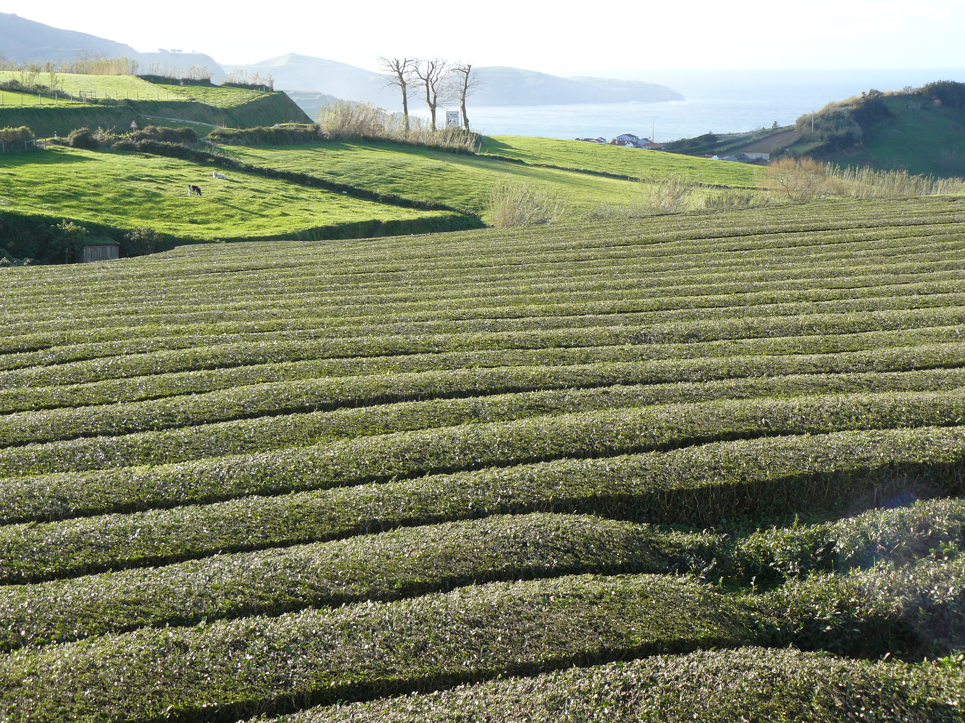 Teeplantage im Atlantik auf São Miguel, Azoren. Eine der wenigen Teeplantagen in Europa.